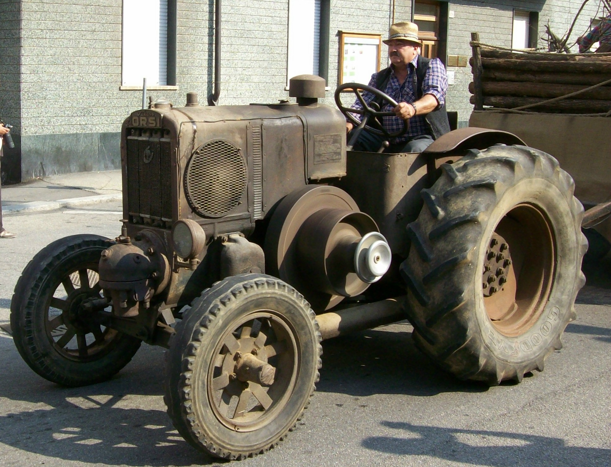 Un antico trattore, simbolo dei contadini